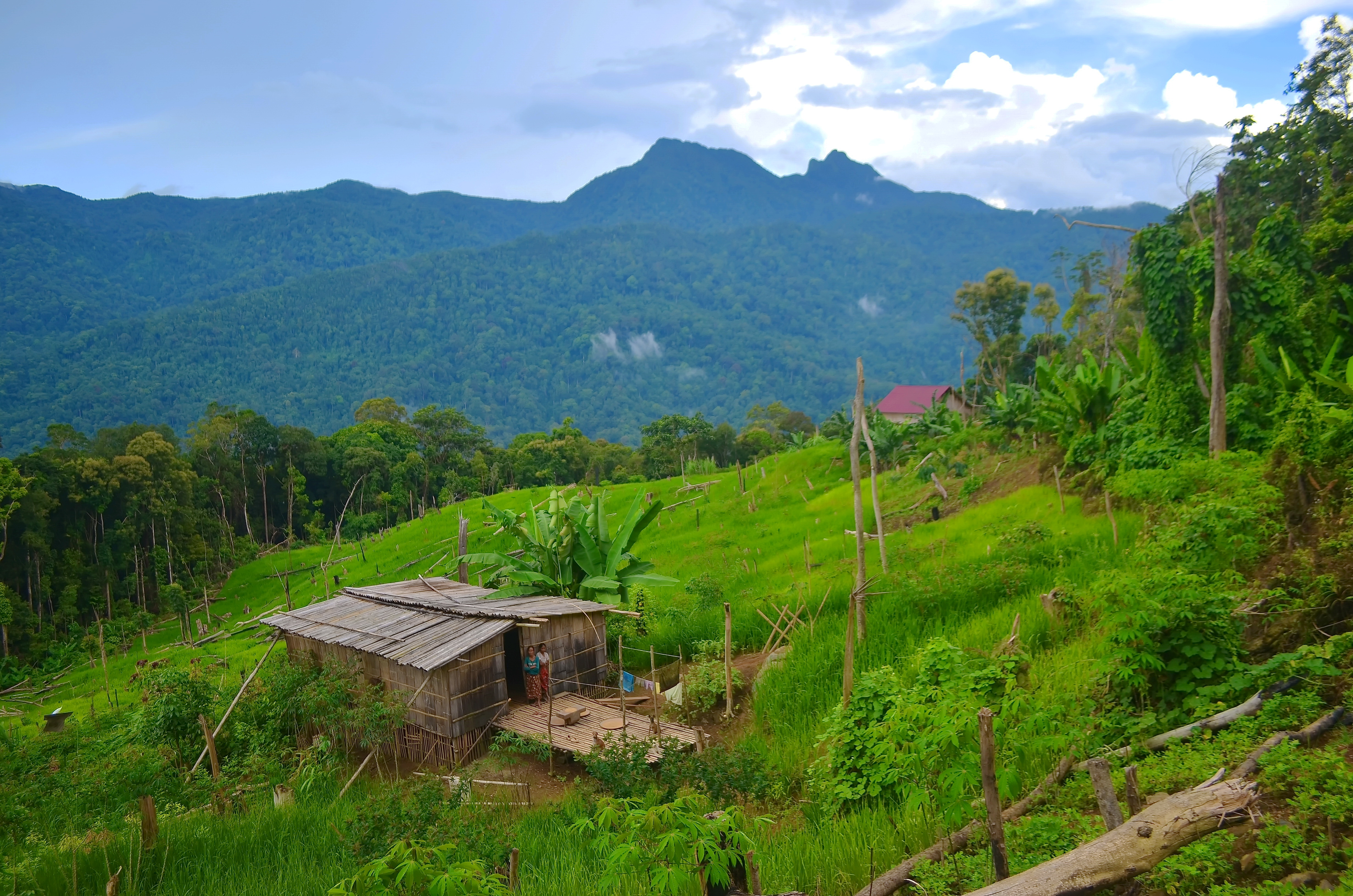 Masyarakat Dayak Rungkah Meratus merupakan peladang padi berpindah, hal ini sudah mereka lakukan turun temurun, sejak nenek moyang mereka. Setiap ladang yang mereka buka hanya bisa dipakai untuk dua kali masa tanam, karena untuk masa tanam berikutnya, tanah sudah tidak subur lagi untuk ditanami padi. Selanjutnya ladang tersebut akan mereka biarkan menjadi hutan kembali. Nanti setelah 6 hingga 15 tahun kemudian lahan ini akan mereka buka kembali. Atau bisa juga lahan yang sudah mereka tanami selama 2 masa tanam tadi mereka jadikan hutan untuk menanam pohon Kayu Manis, Jengkol, kemiri dan lain-lain. Tampak di belakang ladang ini berdiri kokoh gunung Halau-Halau yang merupakan gunung tertinggi di Kalimantan Selatan, di mana menurut peta kolonial Belanda yang liris tahun 1924 puncaknya berada di ketinggian 1892 meter di atas permukaan laut.